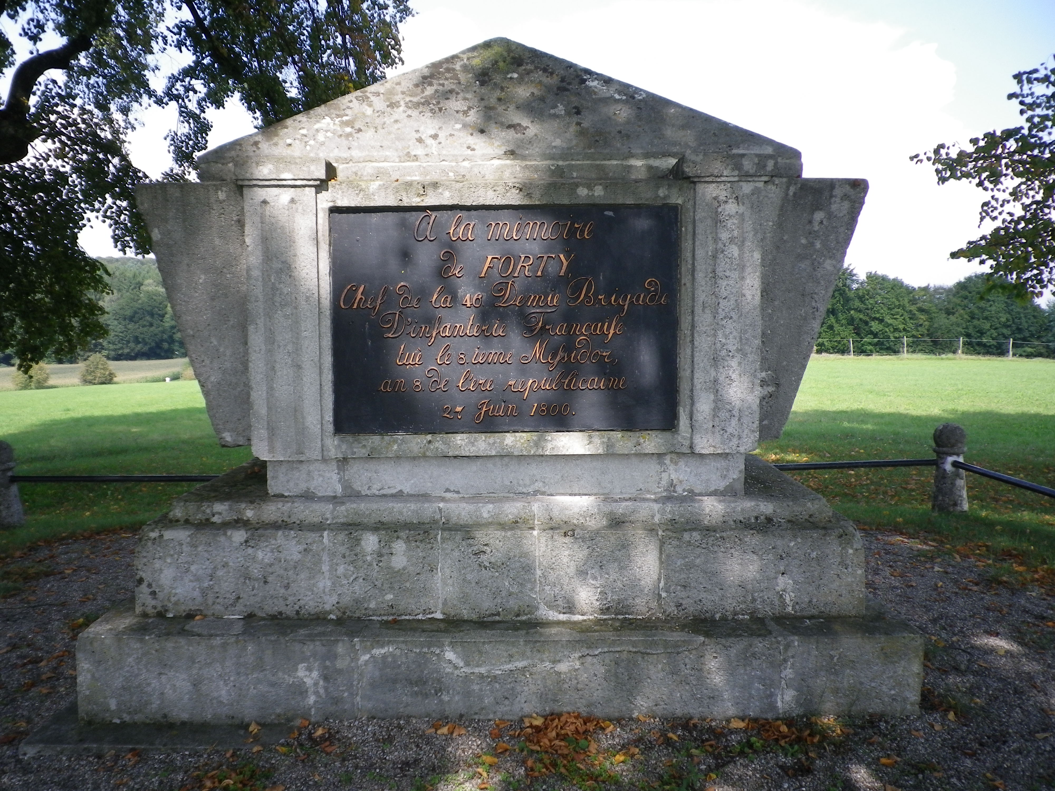 Steinsarkophag zum Gedenken an den am 27. Juni 1800 gefallenen französischen Nationalhelden La Tour d’Auvergne. Das manshohe Denkmal befindet sich auf einer Anhöhe nahe Oberhausen bei Neuburg an der Donau und steht dort bis heute auf französischem Staatsgebiet. Inschrift: À la mémoire de FORTY Chef de la 46. Demie Brigade D'infanterie Francaise tuè le 8.ieme Mehsidor, an 8. de l'ere republicaine 27 Juin 1800.